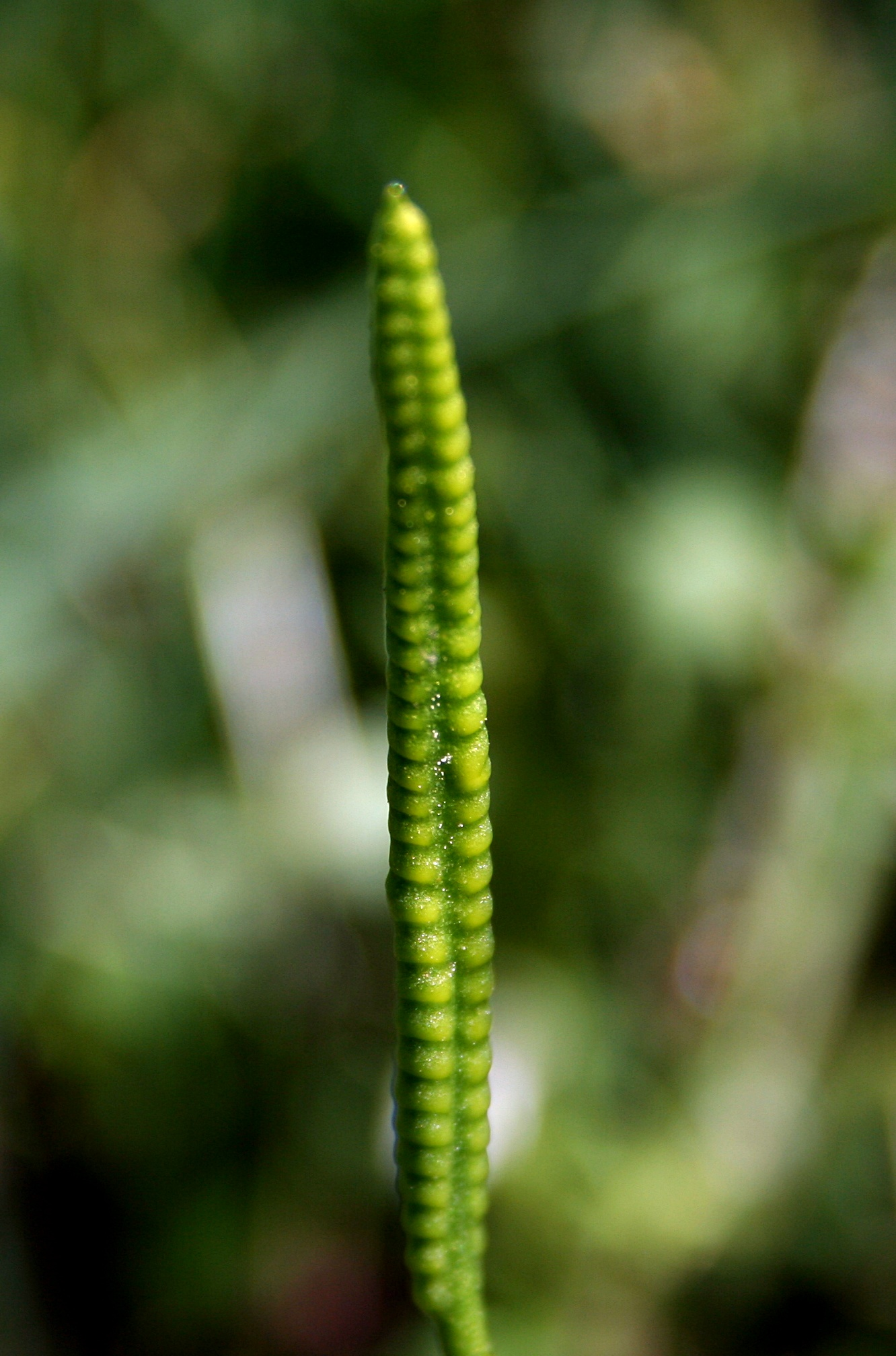 Park Narodowy Bory Tucholskie, kłos nasięźrzała pospolitego